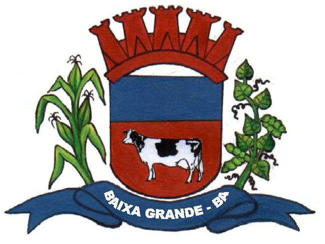 Brasao Baixa Grande